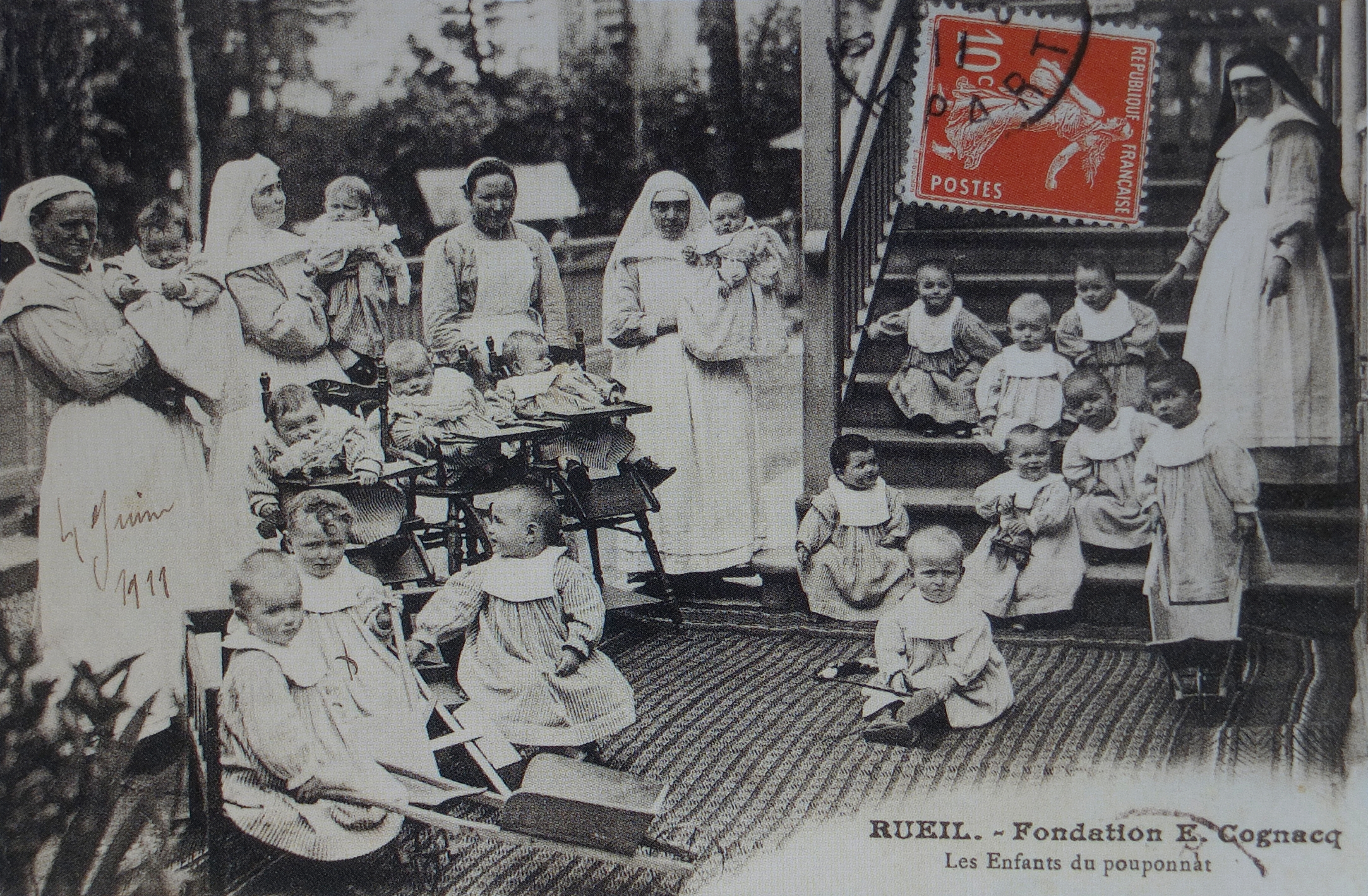 Fondation Ernest Cognacq-Jay à Rueil-Malmaison (Hauts-de-Seine) Les Enfants du pouponnat. Carte postale vers 1910, utilisée en 1911. Photographe et éditeur inconnu.